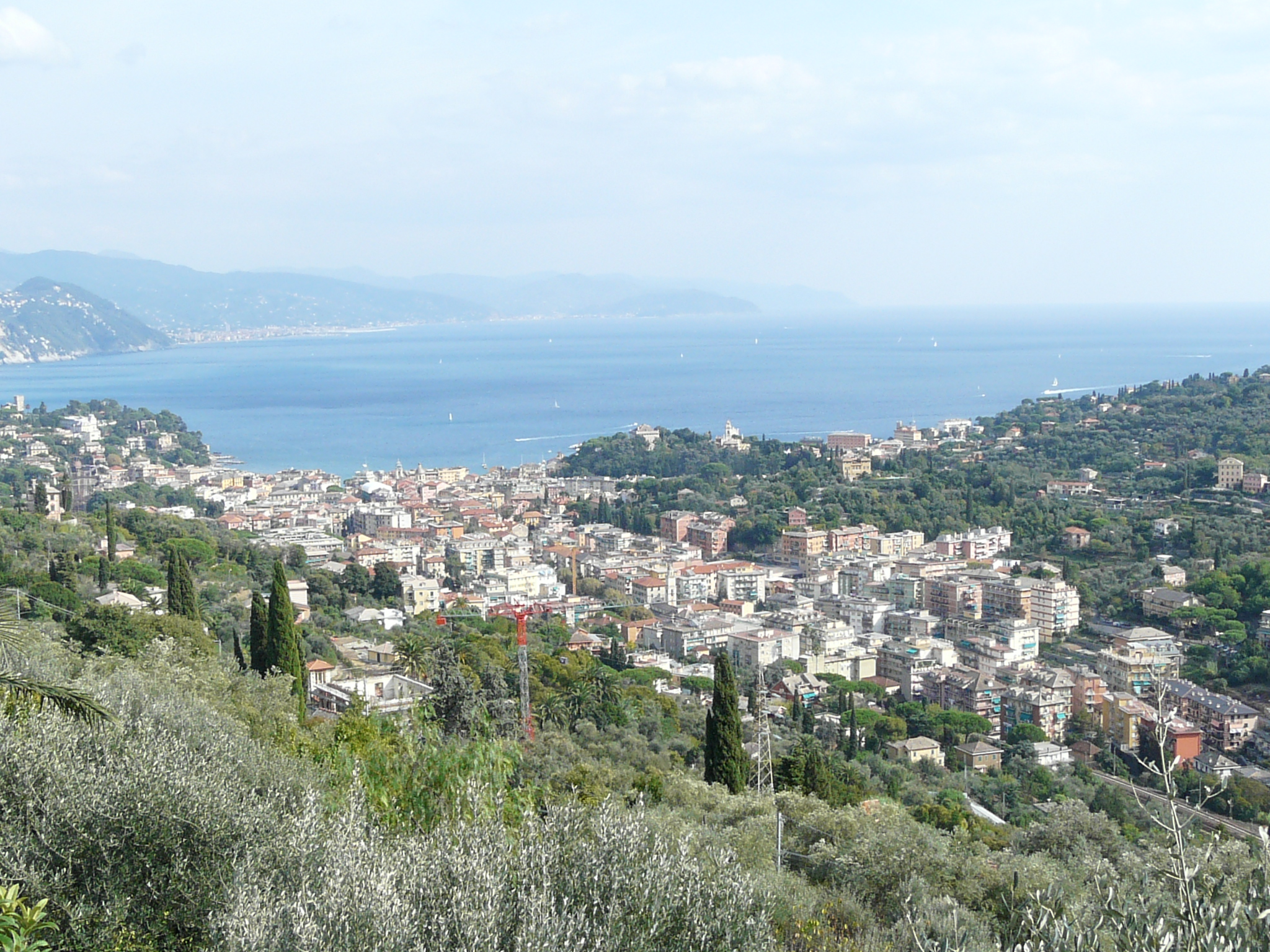 Panorama dalla frazione di San Lorenzo della Costa di Santa Margherita Ligure, Liguria, Italia